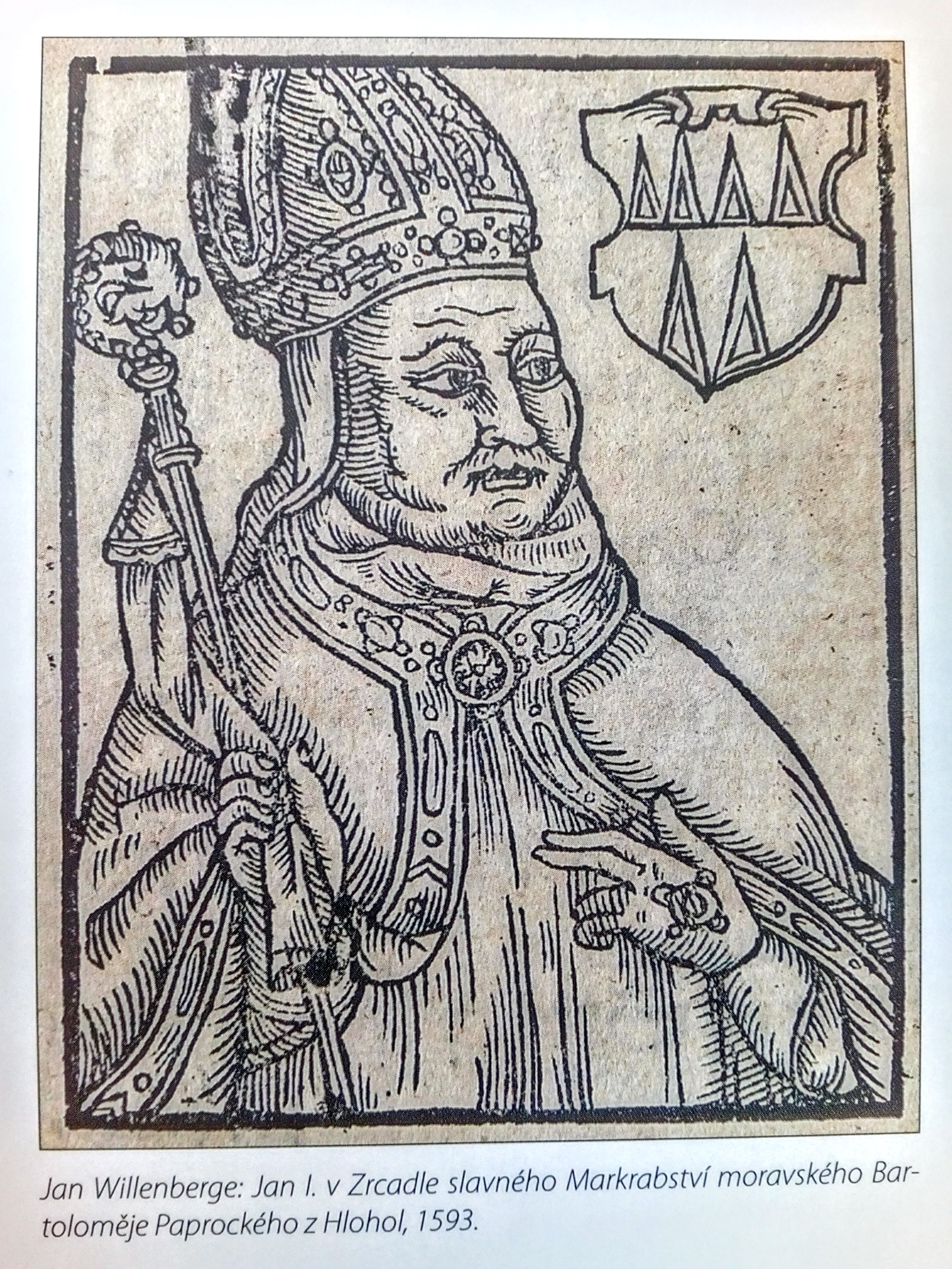 Jan I. v Zrcadle slavného Markrabství moravského Bartoloměje Paprockého z Hlahol, 1593